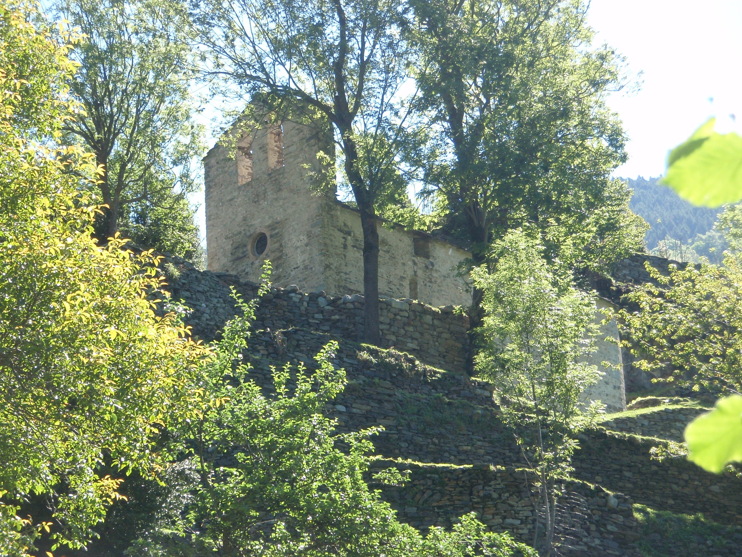 El Catllar, Vall de Camprodon, Catalunya